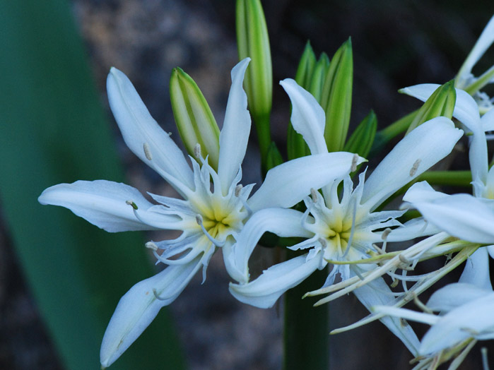 Pancrace d'Illyrie, dans la montagne Corse